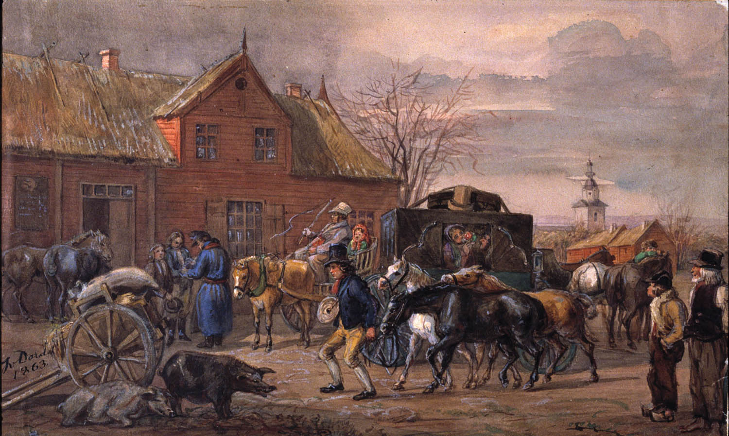 Gästgivaregård i Halland, 1863. Akvarell av Fritz von Dardel (1817-1901), Nordiska museets föremål inv nr 67493.